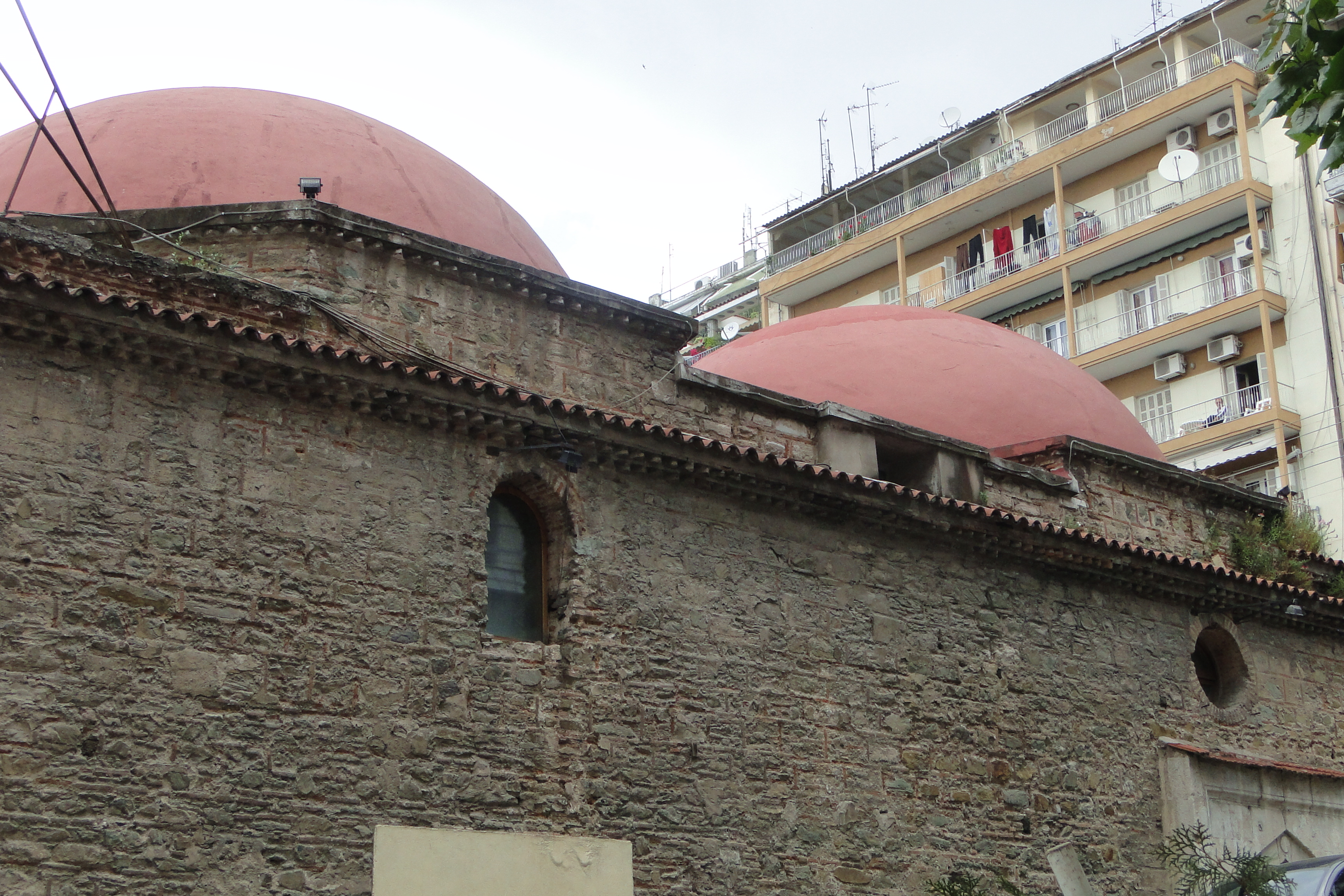 Hamam Othomanorum Thessalonicae quod inter annos 1575-1600 aedifictum est.